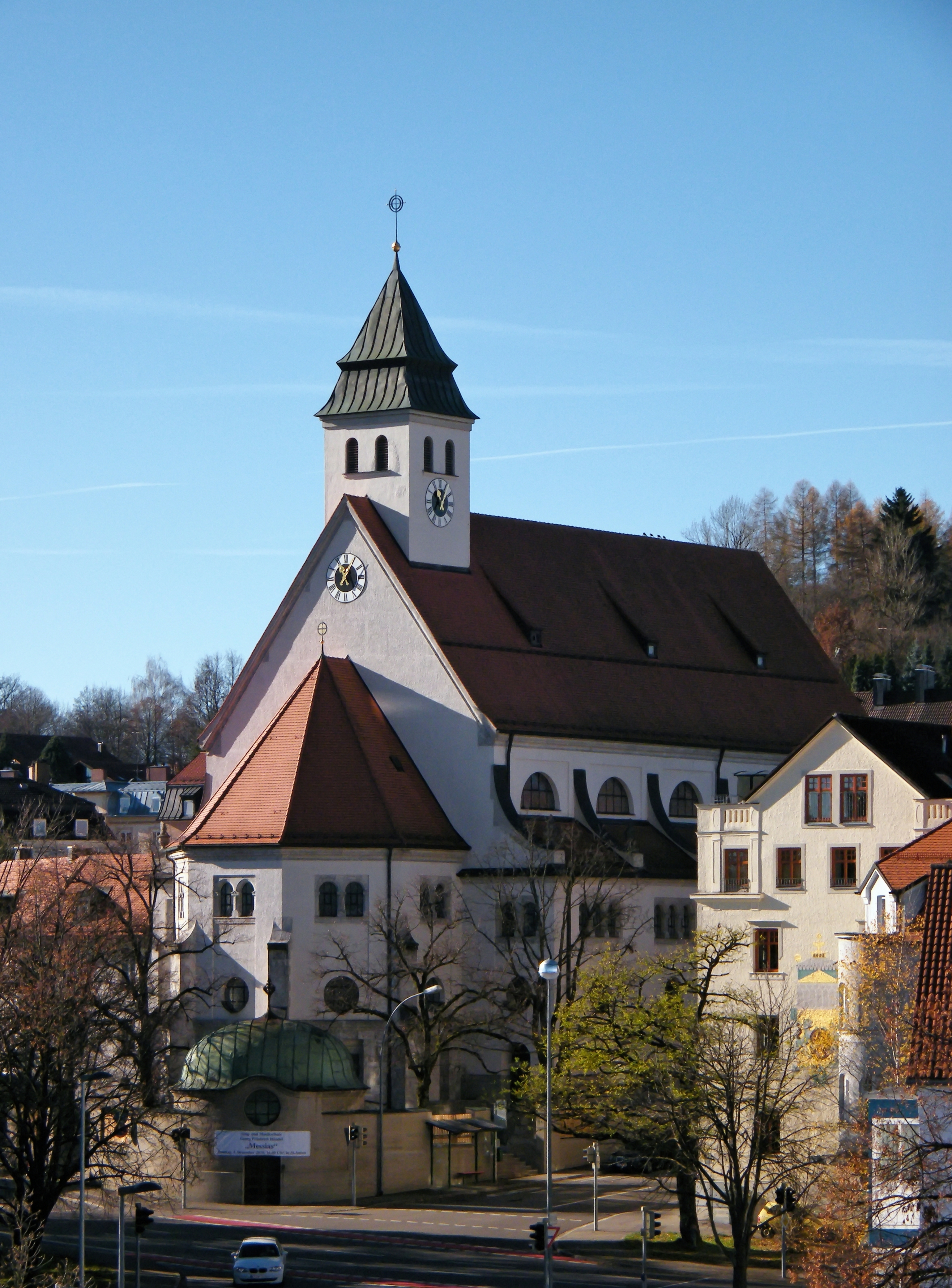 Allgäu, Winter 2010 Church/Kirche St. Anton in Kempten